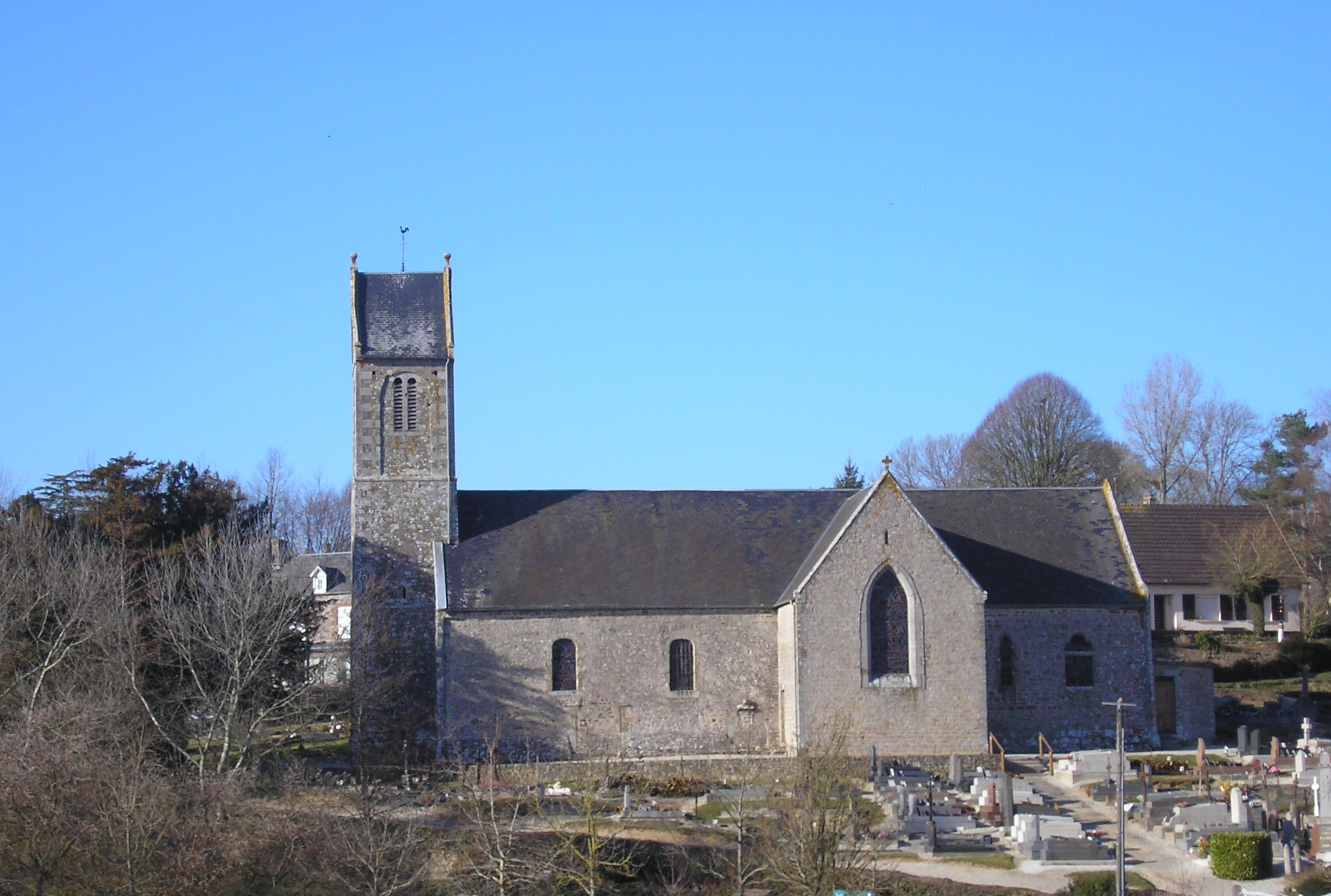 Le Chefresne (Normandie, France). L'église Saint-Pierre.